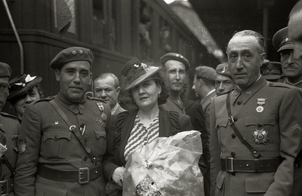 Título original: Llegada a la estación del Norte de soldados heridos en el frente del Este (10/13) Localización: San Sebastián (Guipúzcoa)